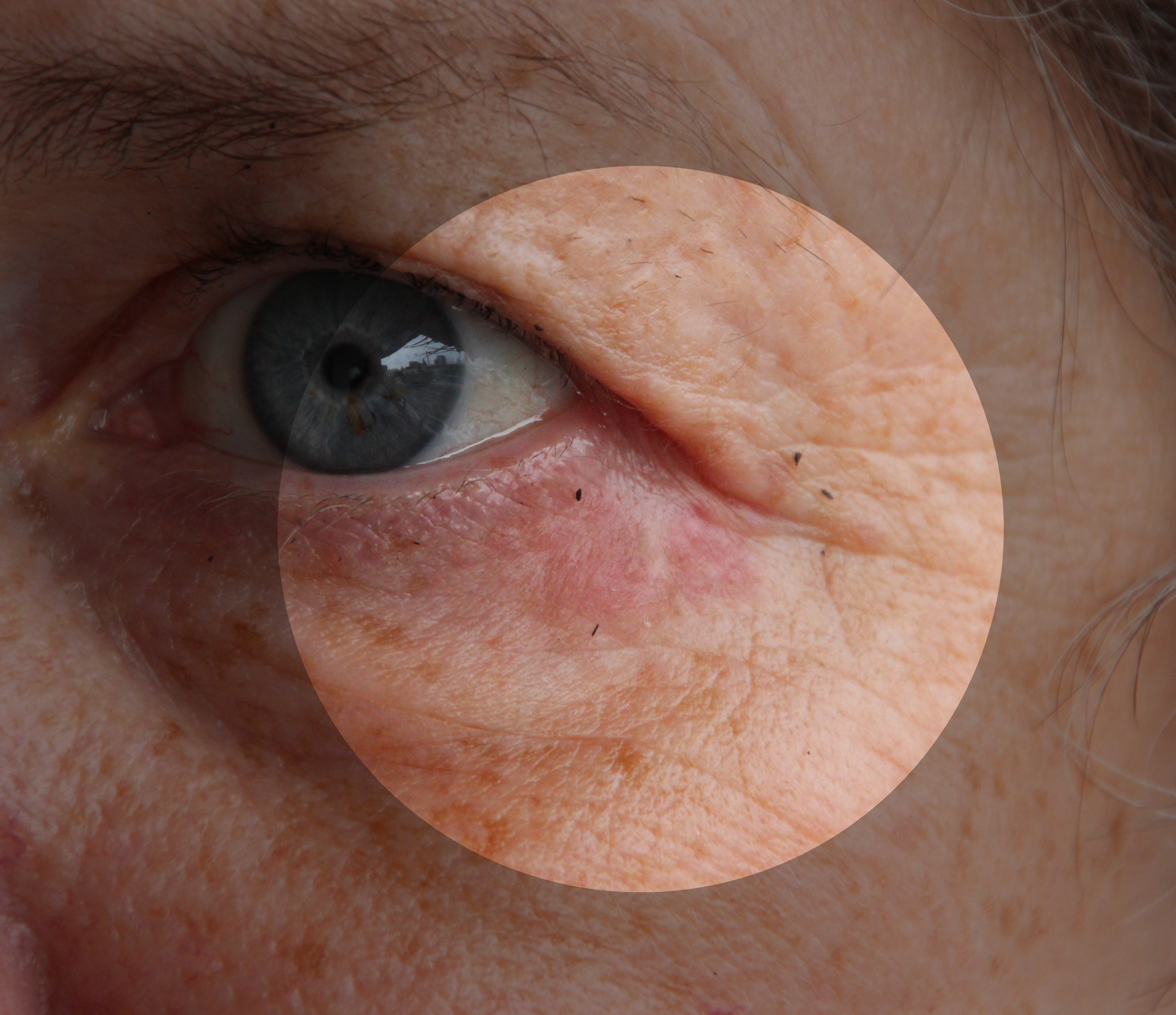 Bildinhalt: Periorale Dermatitis am linken Auge. Rest des Gesichts abgedunkelt. Aufnahmeort: Frankfurt am Main, Deutschland